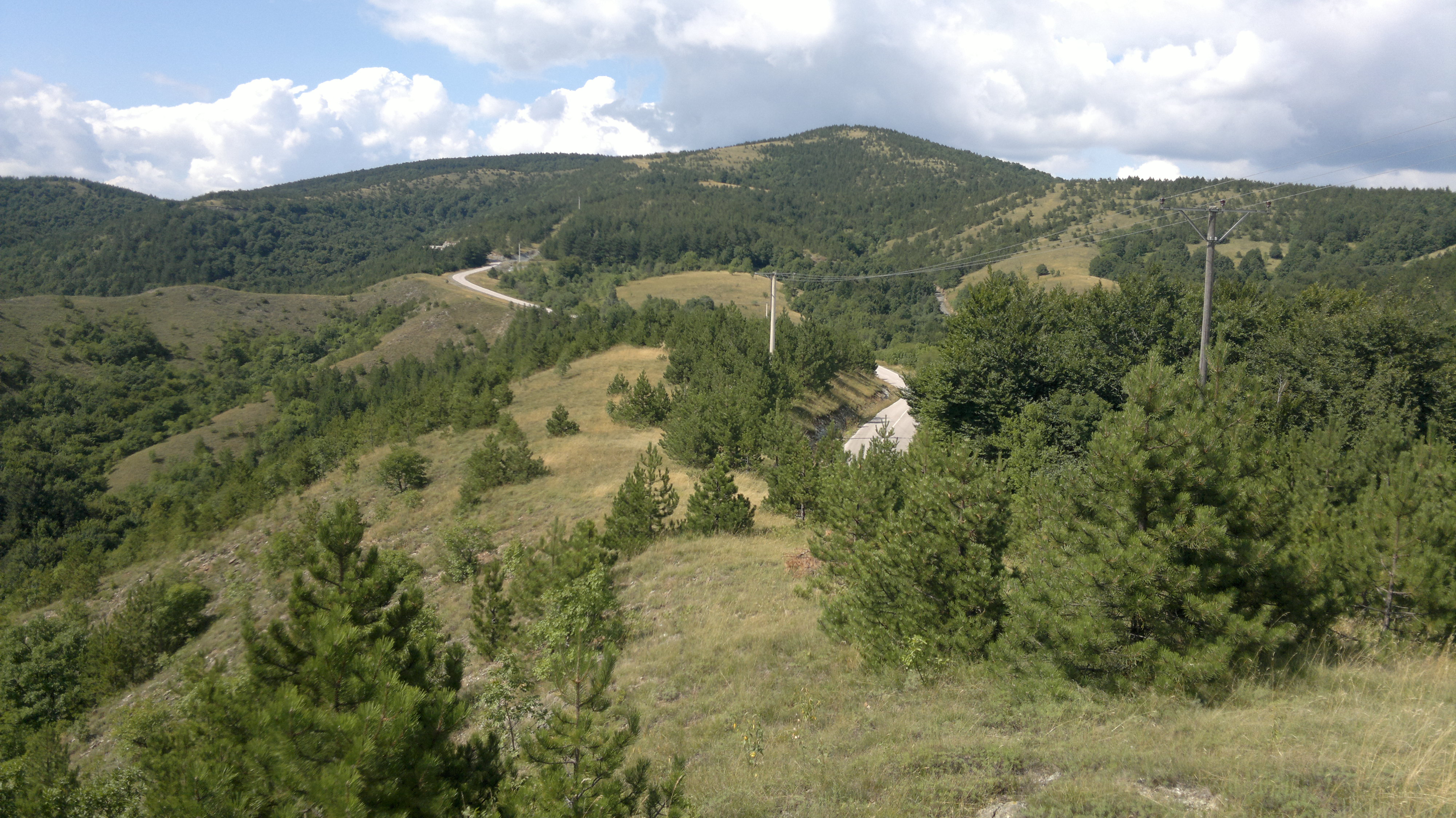 Put prema Ravnoj gori